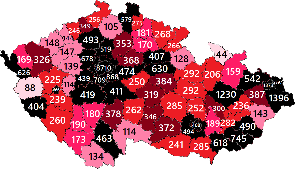 Mapa celkově zaznamenaných případů nemoci covid-19 v Česku podle okresů (zdroj